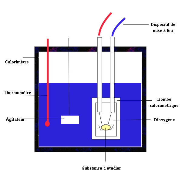 Schéma d'un bombe calorimétrique. Image personnelle.